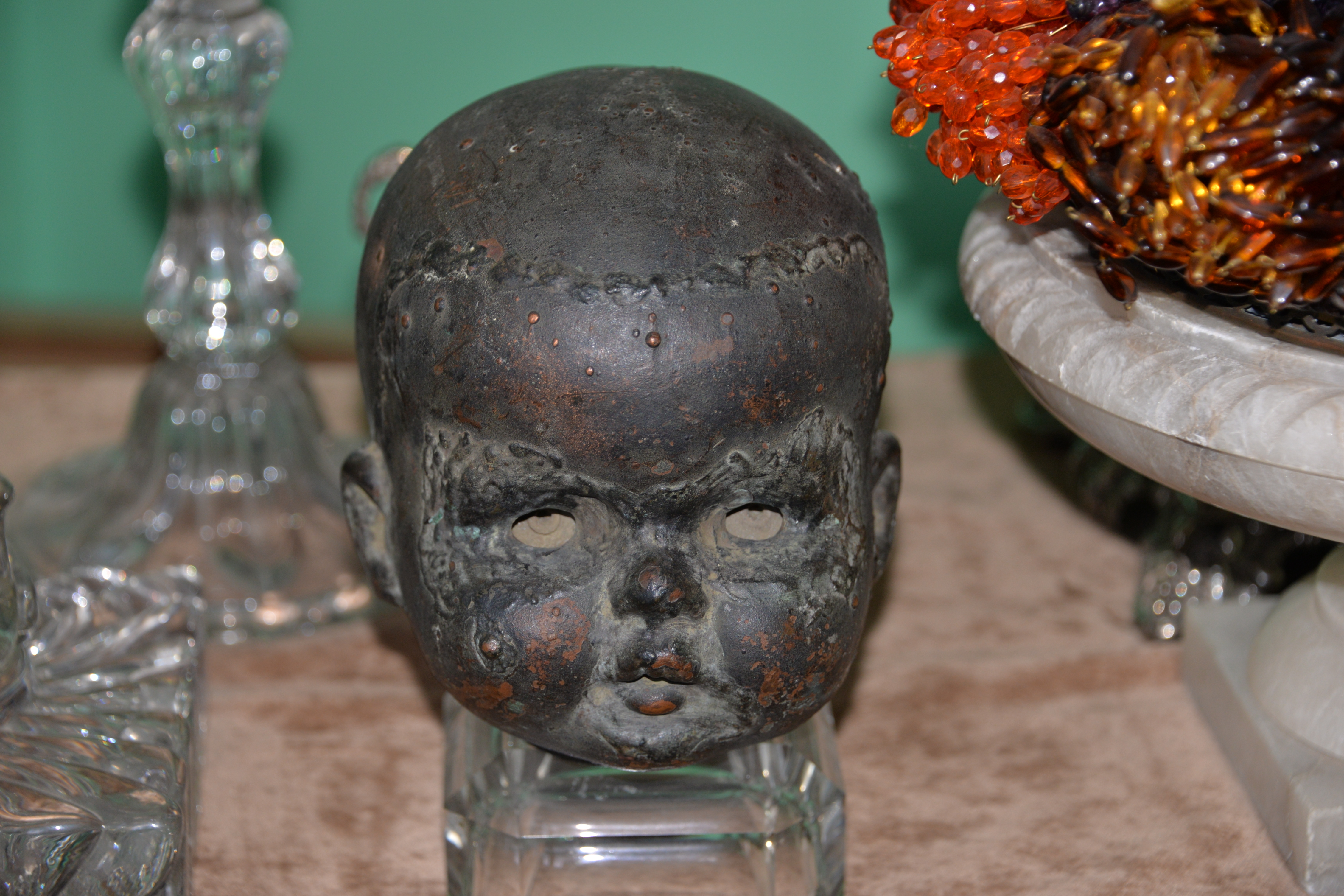 2014 11 23 exposition des artistes chez lAtelier Sculpture